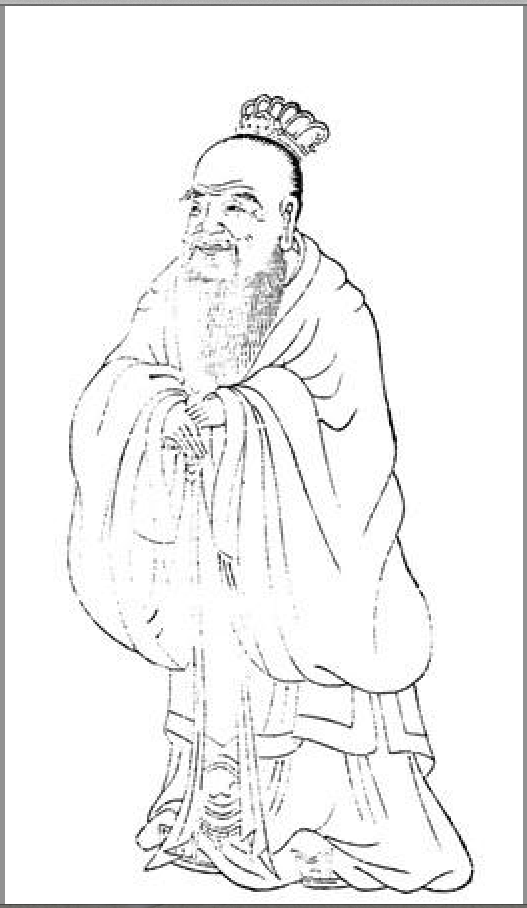 劉淑，東漢黨人，《後漢書・黨錮列傳》 ：「劉淑字仲承，河閒樂成人也。」